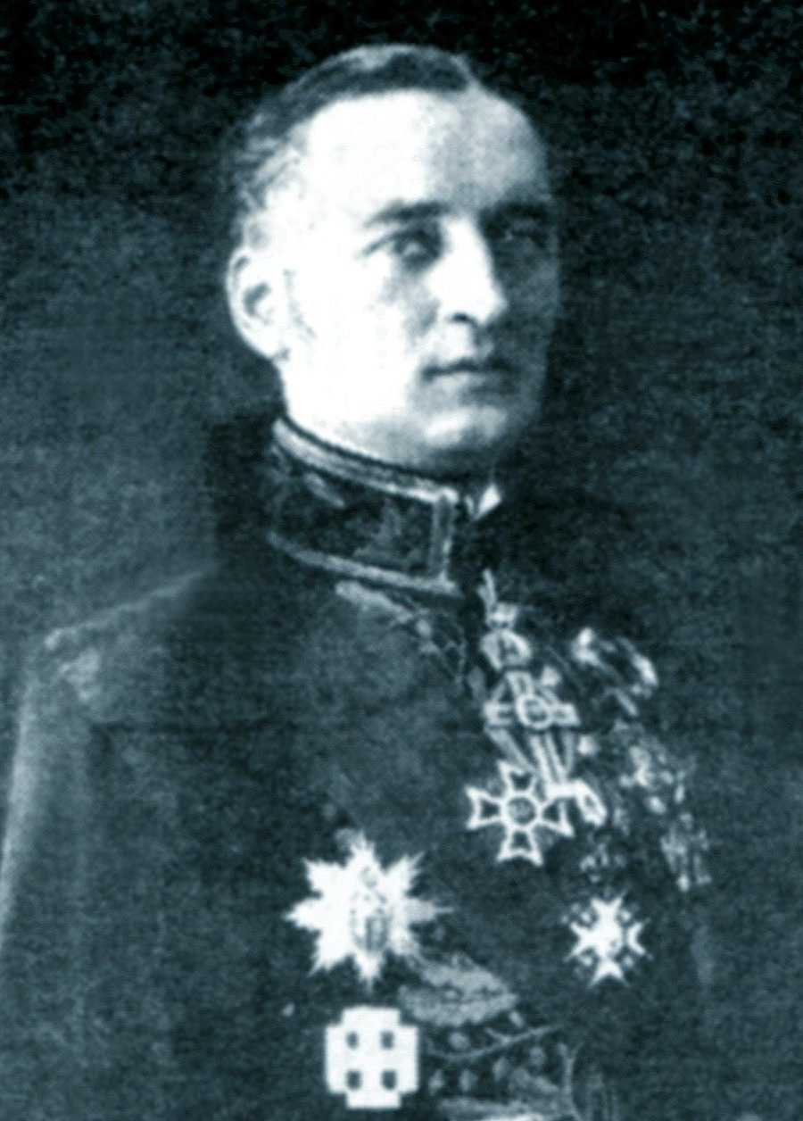 Constantin Ritter von Flondor um 1938 - Ausschnitt